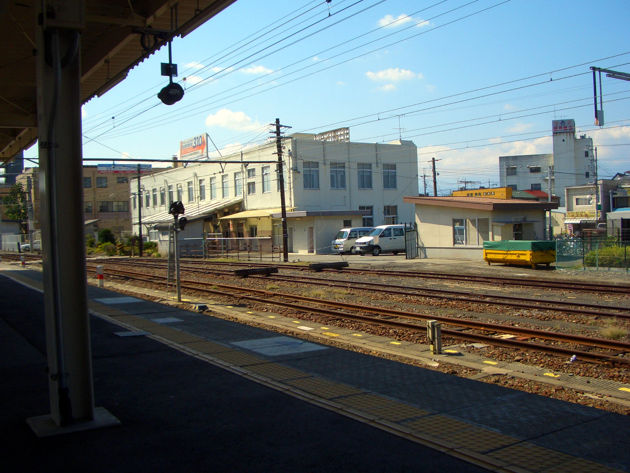 南甲府駅